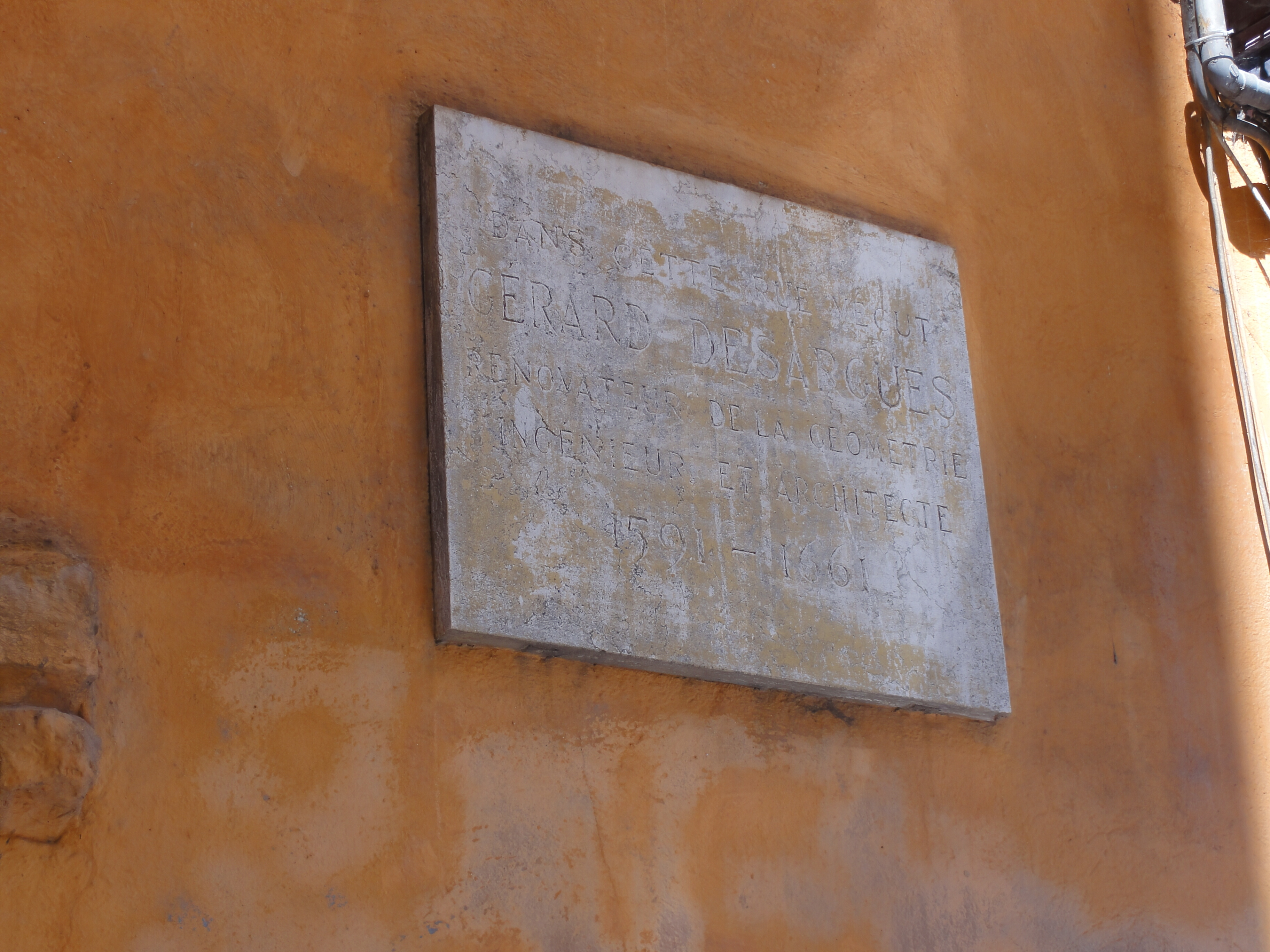 Gérard Desargues : Plaque "ici a vécu" à l'intersection de la rue des Trois Maries et de la rue du Palais de Justice à Lyon.